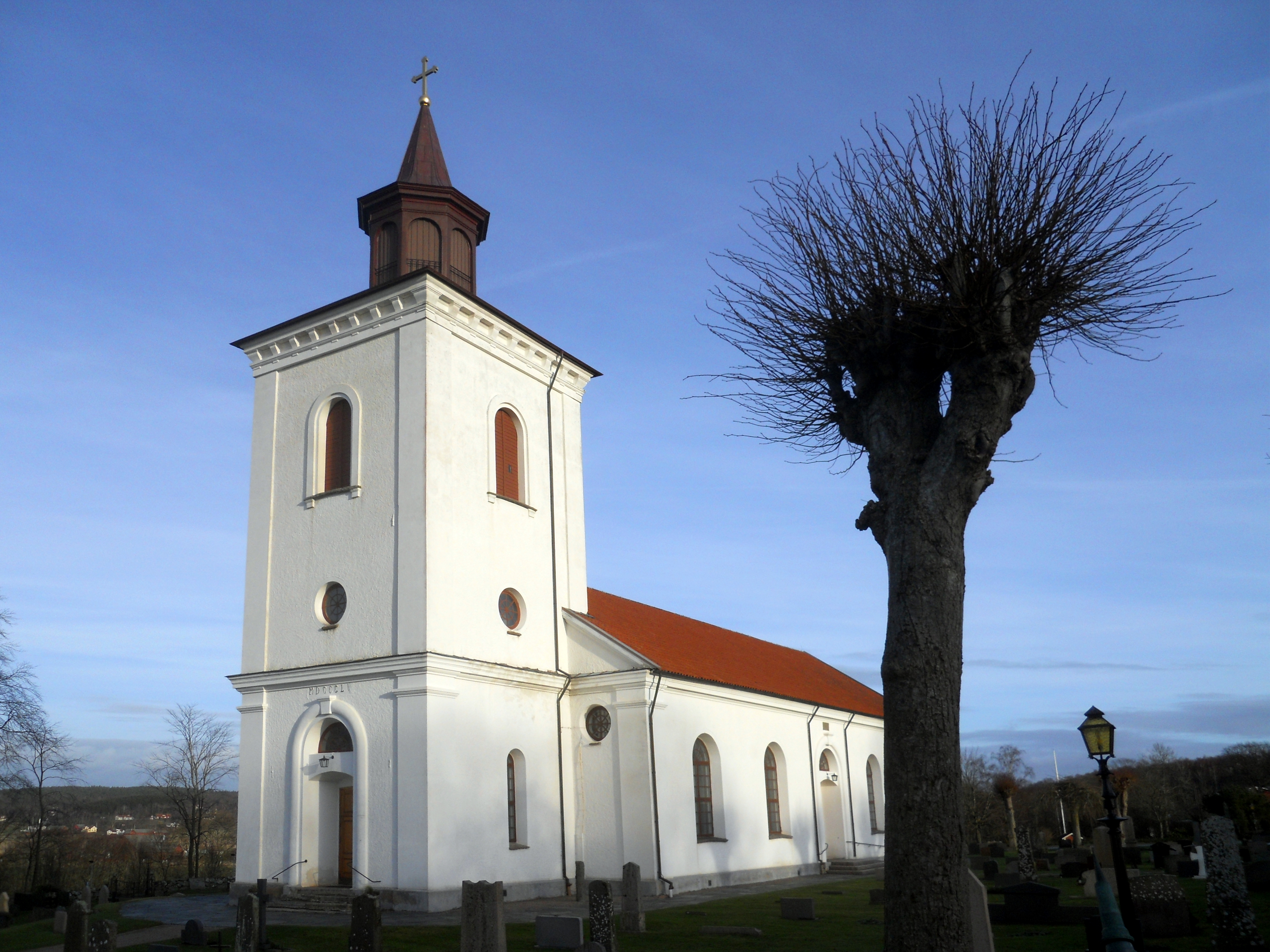 Lindbergs kyrka, Varbergs kommun.